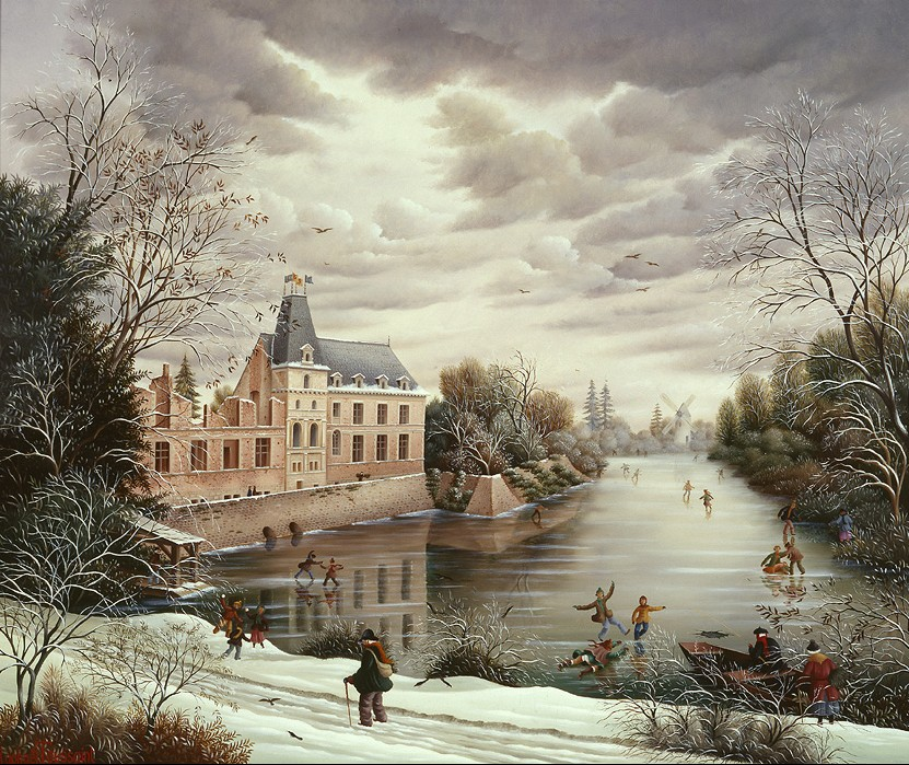 Le Château du Puy du Fou sous la neige du peintre français Raphaël Toussaint. C'est une H.S.B. 38x46. de 1991.